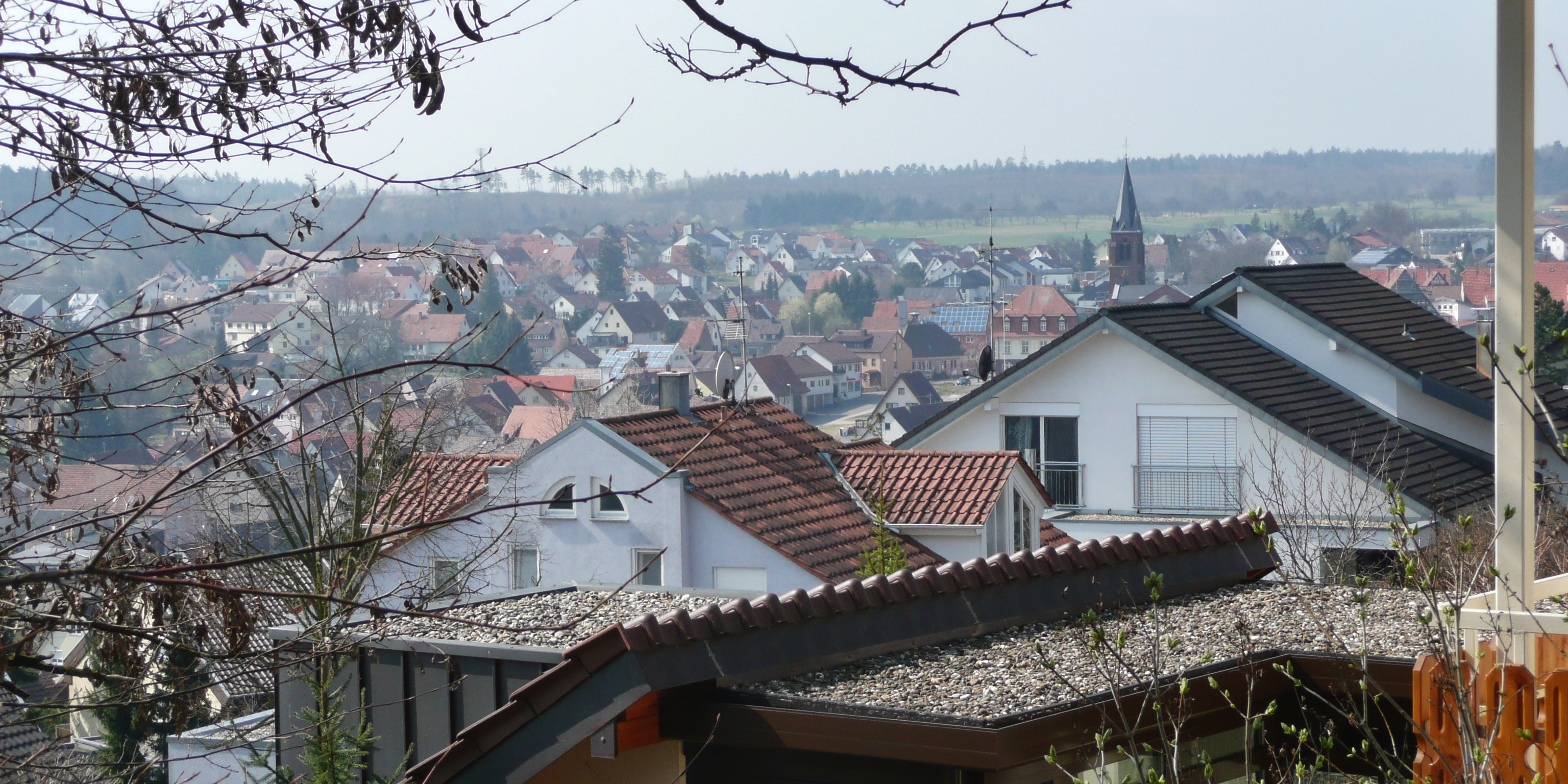 Wimsheim